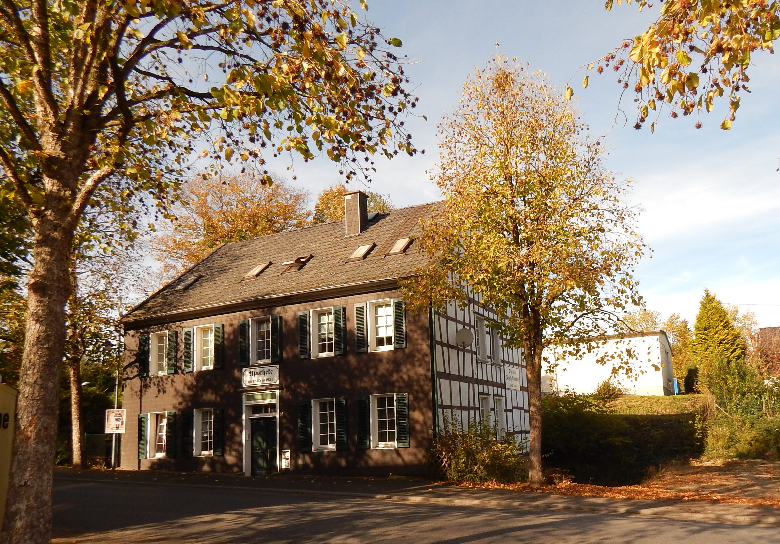 Alte Hirsch Apotheke in der Hauptstraße in Much